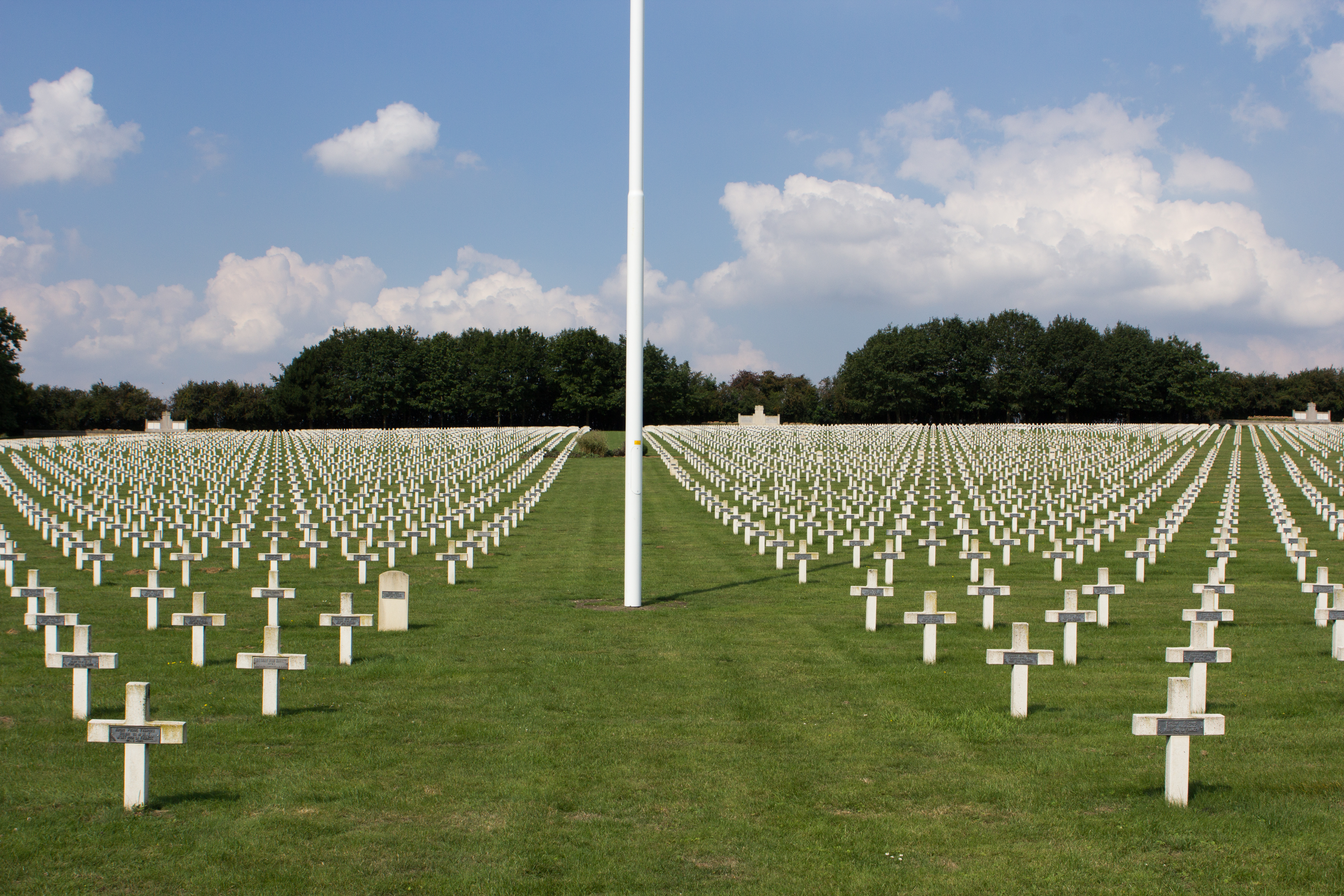 Cimetière militaire français de La Targette / Neuville-Saint-Vaast, Pas-de-Calais, France